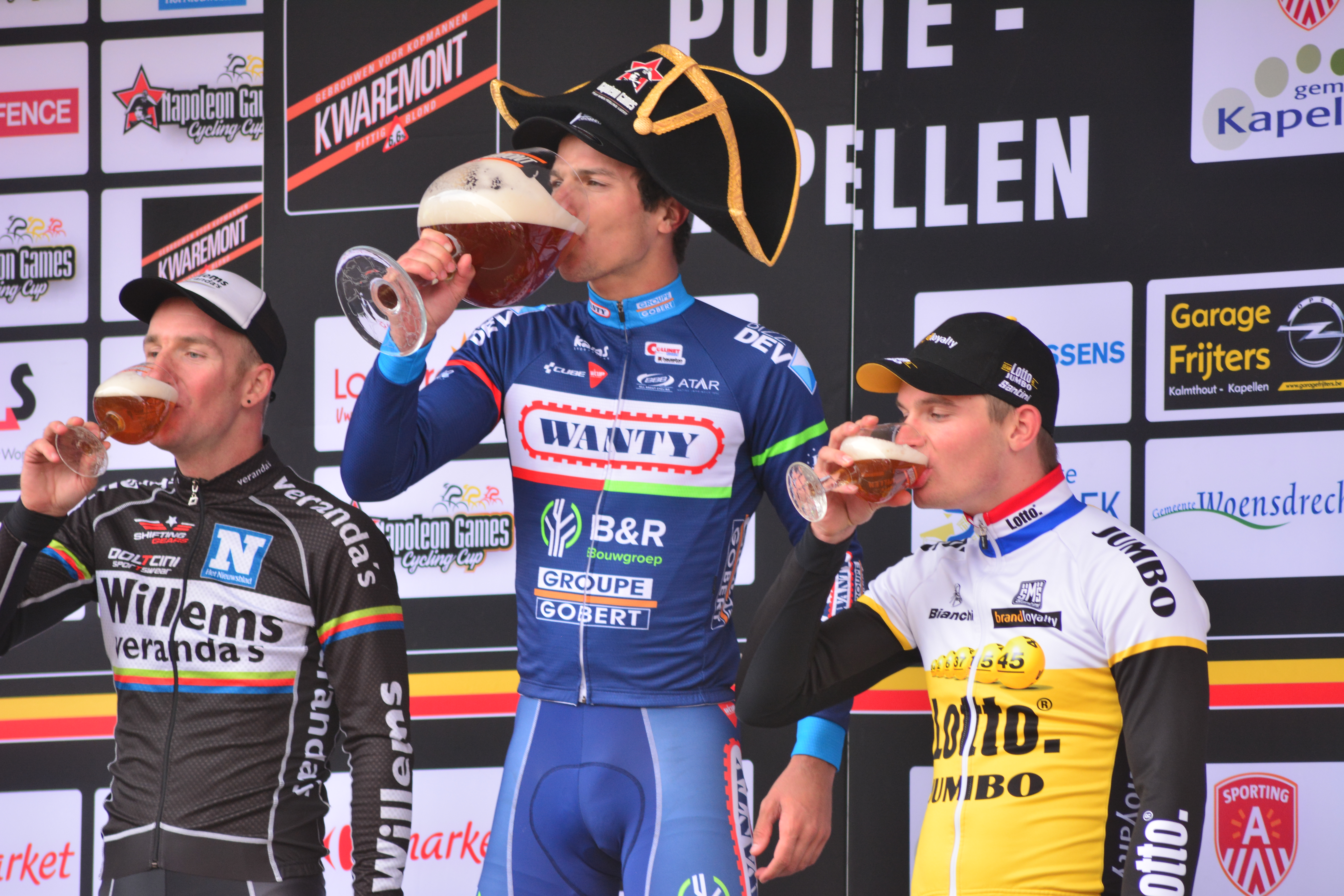 Het podium van de 83e editie van de Nationale Sluitingsprijs Putte-Kapellen van links naar rechts Timothy Dupont, Roy Jans en Moreno Hofland